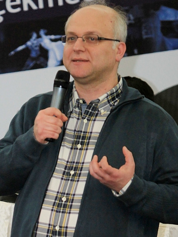 Kemal Sayar